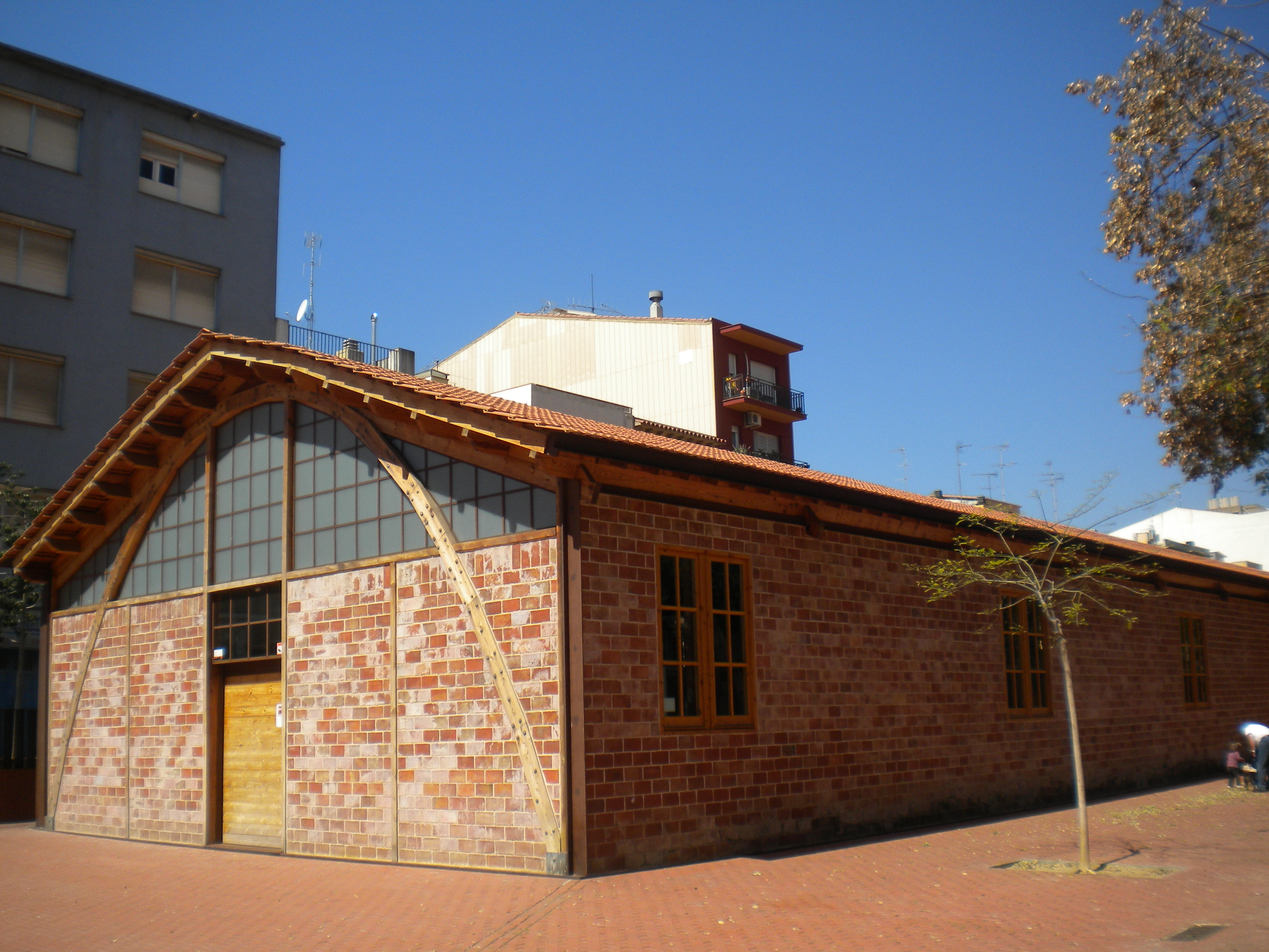 Vista de la Cooperativa Obrera Mataronina, o Ca l'Asensio, a Mataró, Maresme. Dissenyada per Antoni Gaudí.